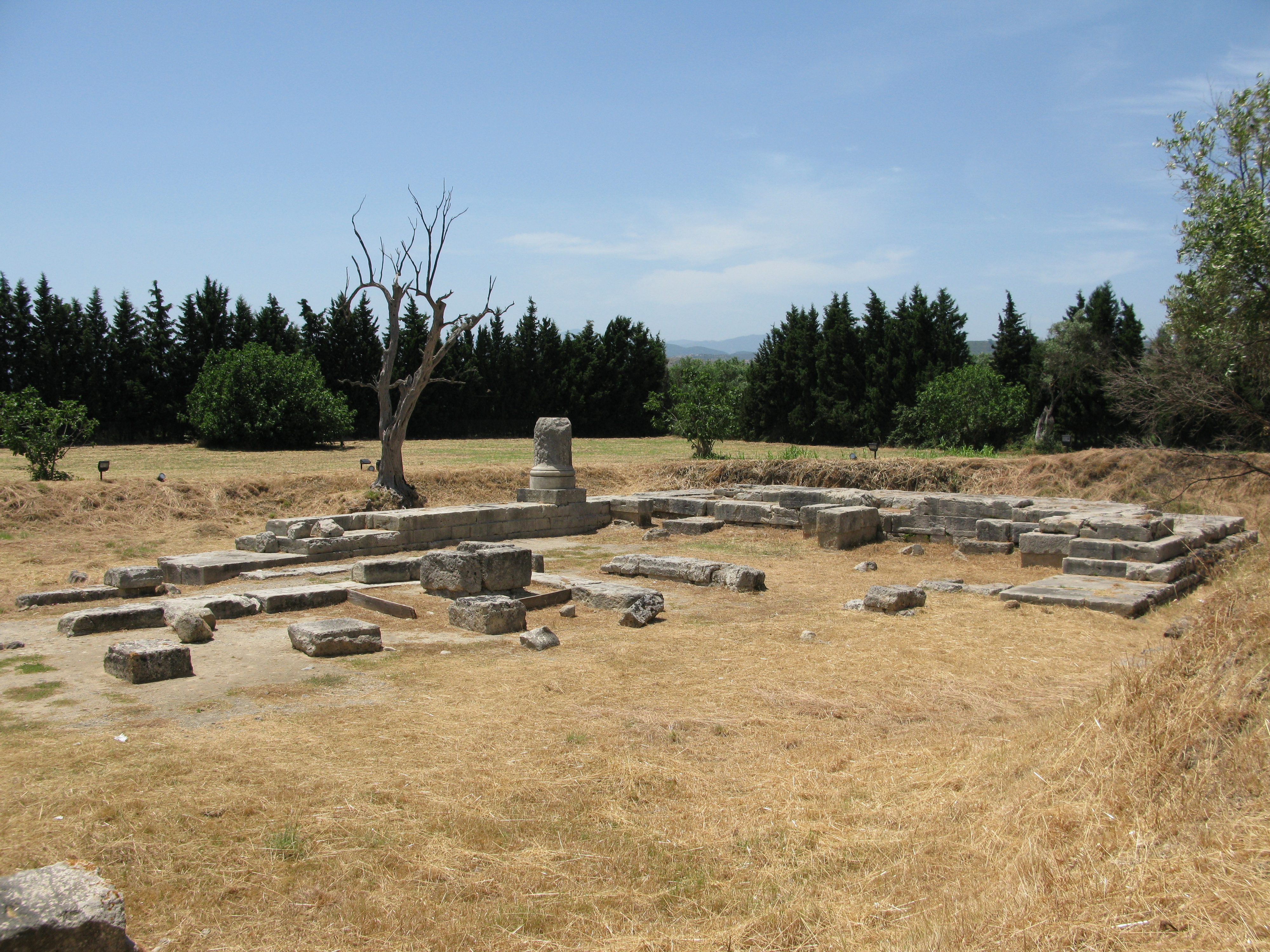 Tempio Ionico di Marasà - prima metà del V secolo a.C.